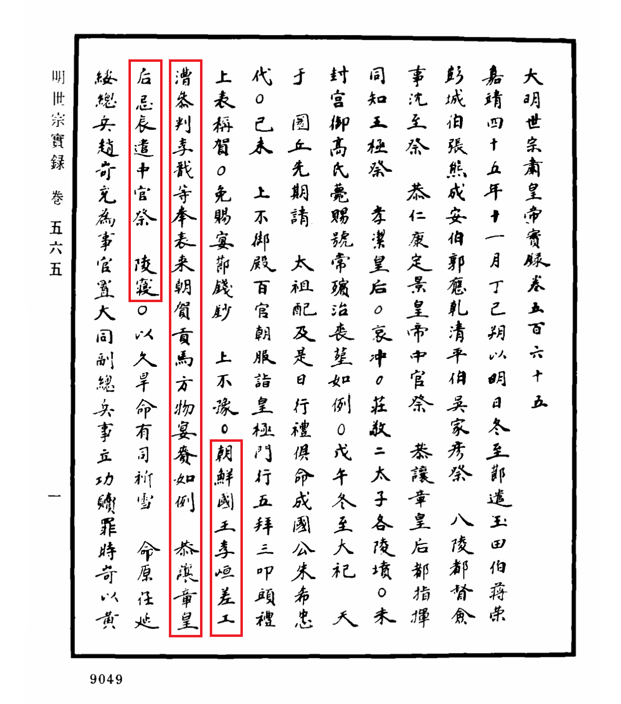 명세종실록 565권, 가정45년 11월 3일자, 9029페이지